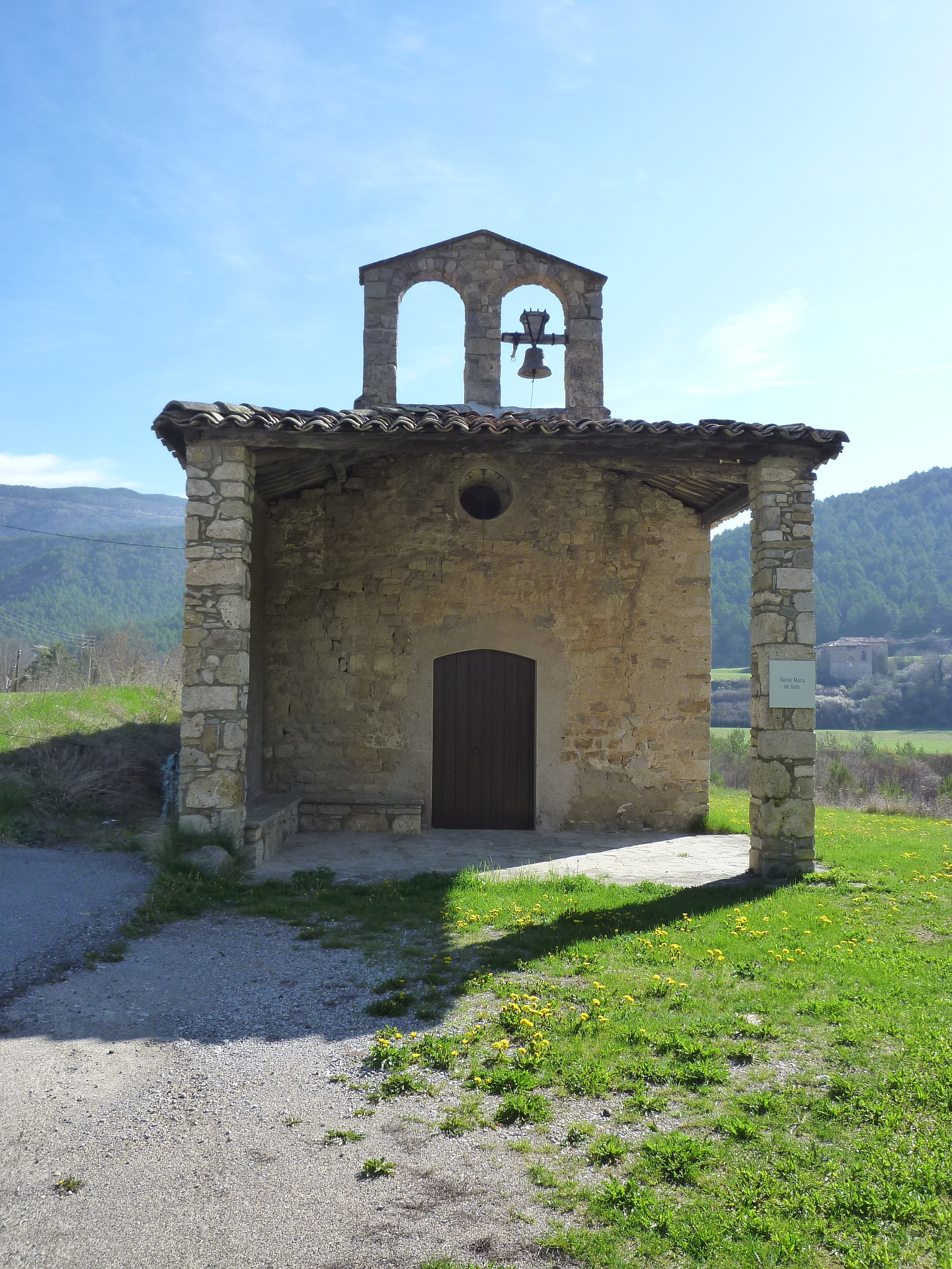 Capella de Santa Maria de Valls, enfront mateix de l'edifici de l'Ajuntament de Guixers